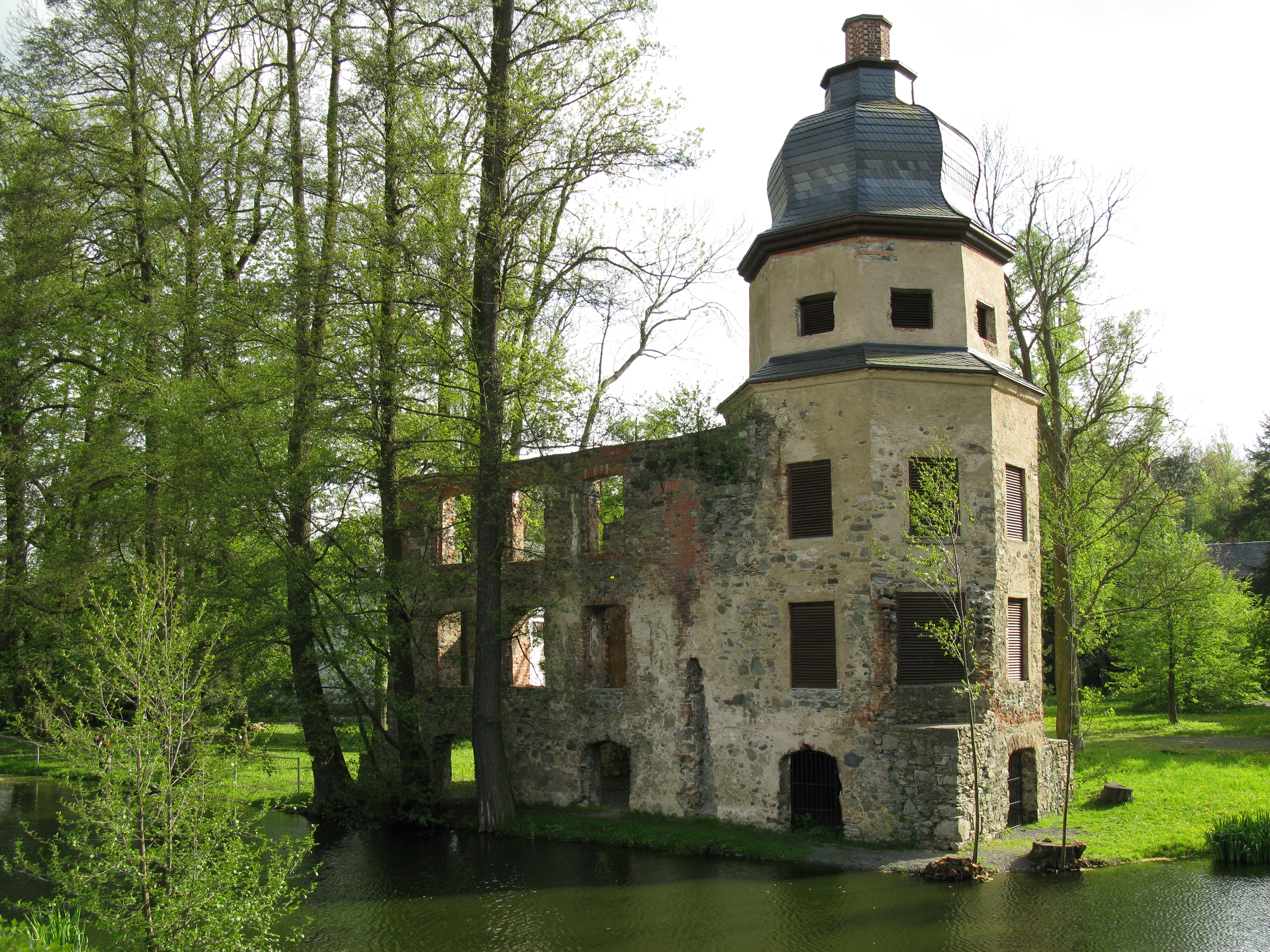 Geilsdorf (Gemeinde Weischlitz), Wasserschloss von Nordosten aus gesehen